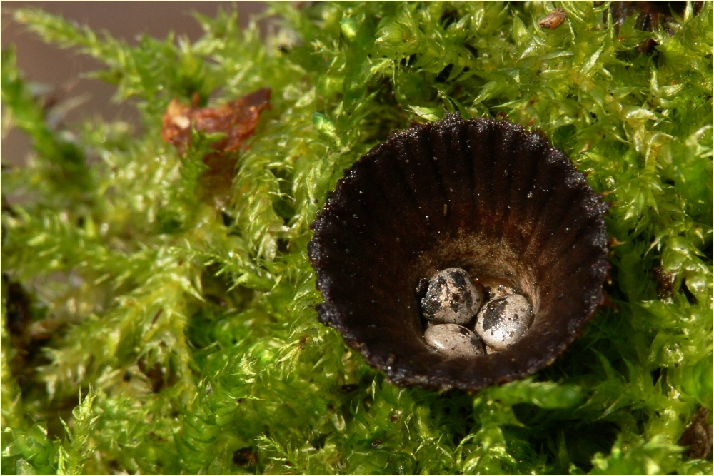 Gestreifter Teuerling (Cyathus striatus)